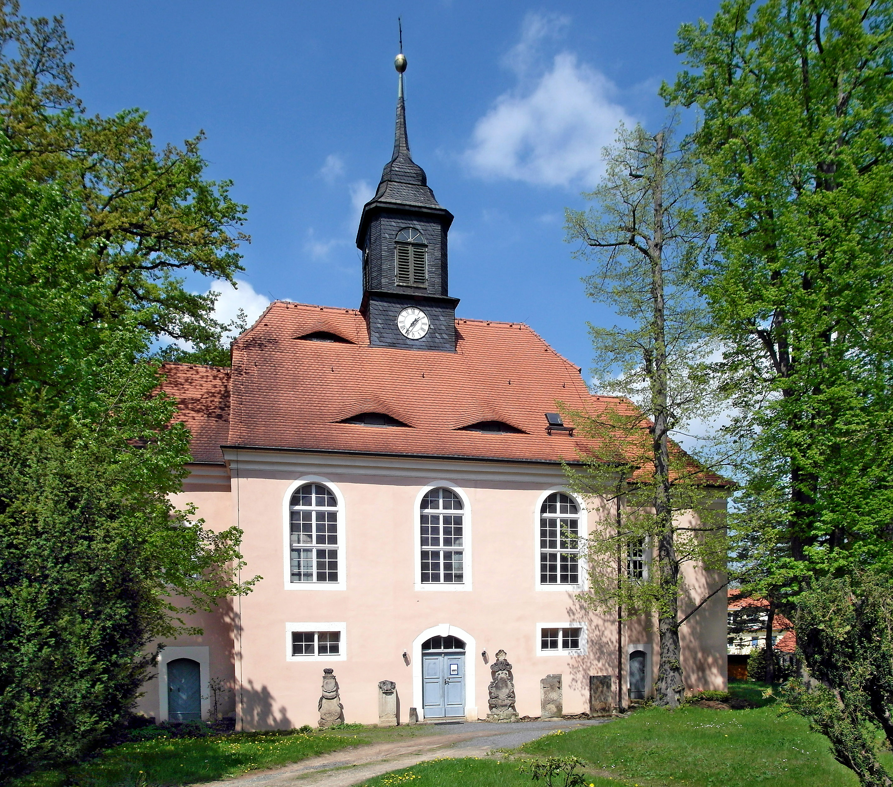 08.05.2013 01809 Röhrsdorf (Dohna), Hauptstraße (GMP: 50.962049,13.810801): Spätbarocke evangelische Dorfkirche, 1749 von Andreas Hünigen. Sicht von Süden. [SAM6132.JPG]20130508060NR.JPG(c)Blobelt